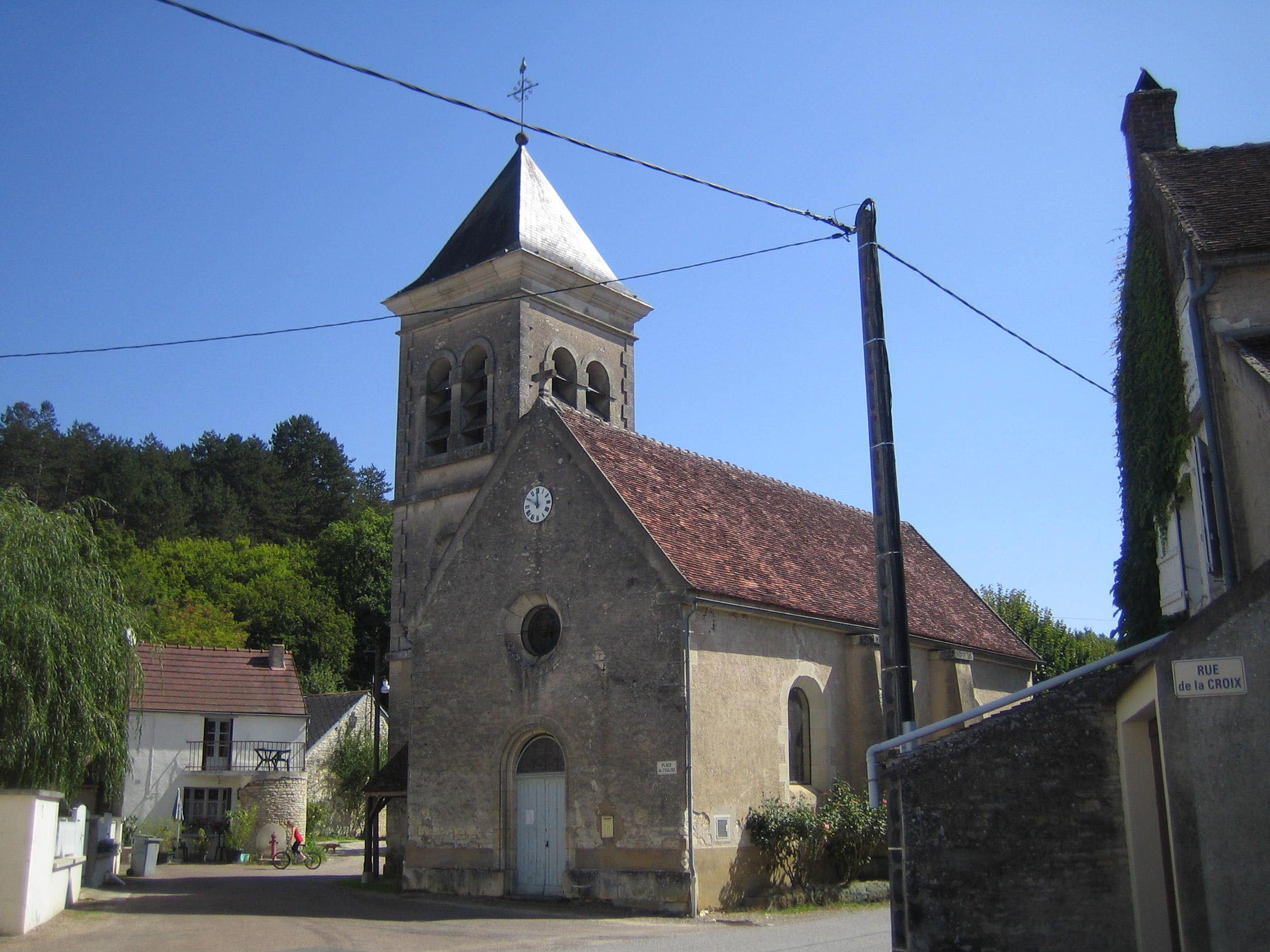 Lucy-sur-Cure (Yonne, Bourgogne, France. L'église d'Essert.